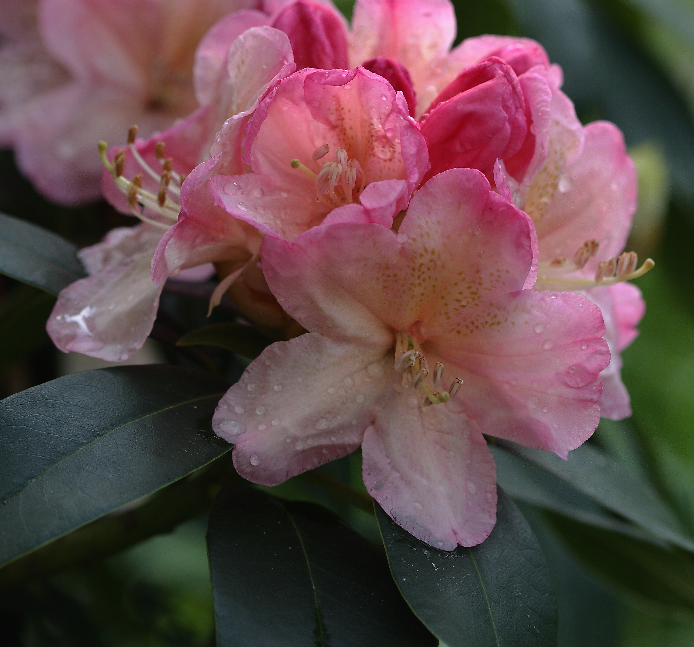 Zwerg-Rhododendron yakushimanum 'Percy Wiseman'